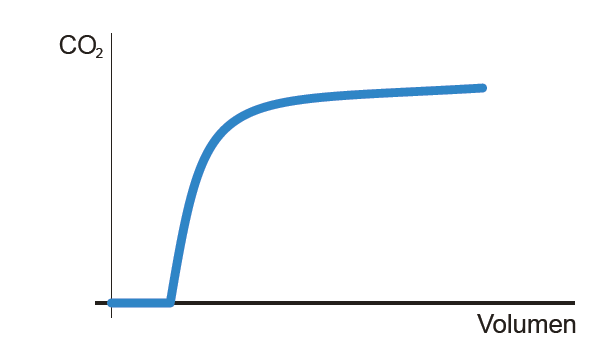 capnograma volumetrico estandar